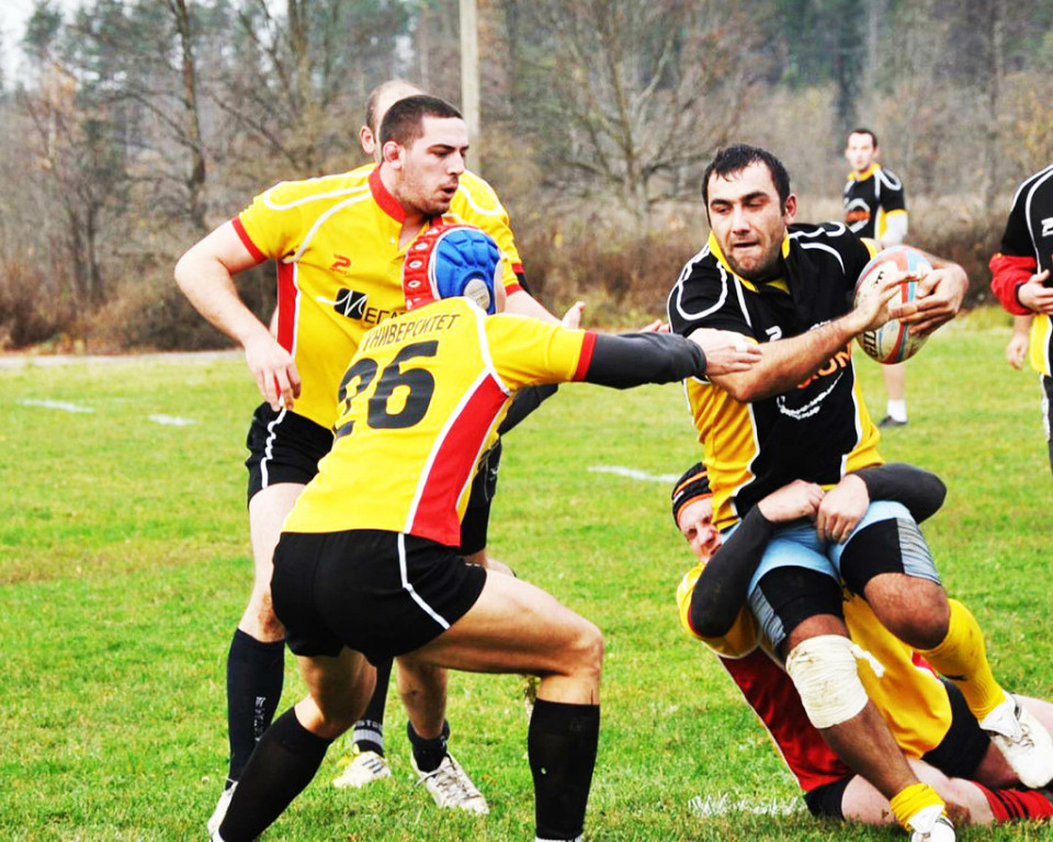 ннннн